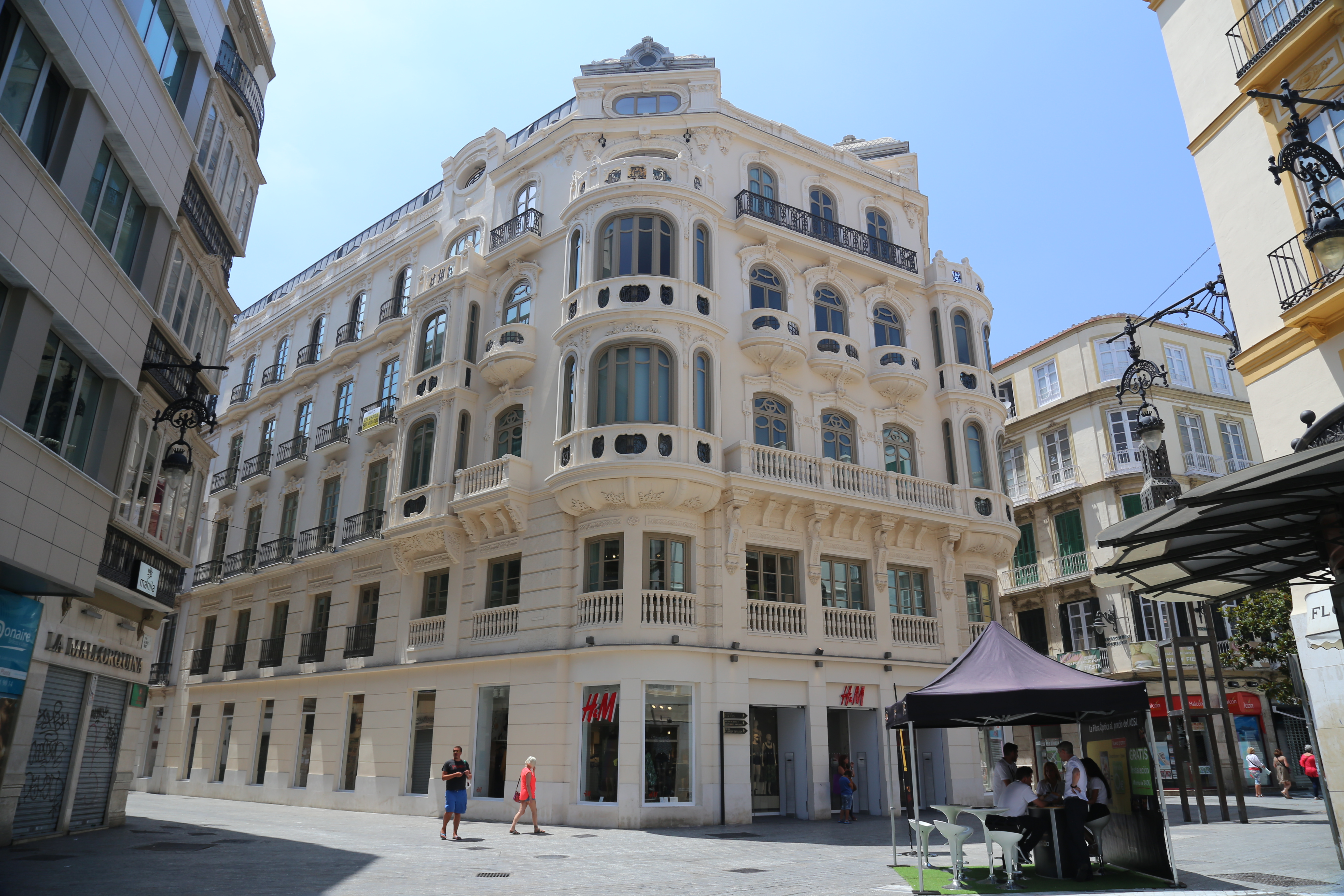 Centro Histórico, Málaga, Spain